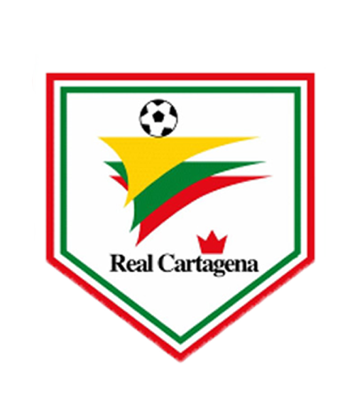 Escudo antiguo de Real Cartagena